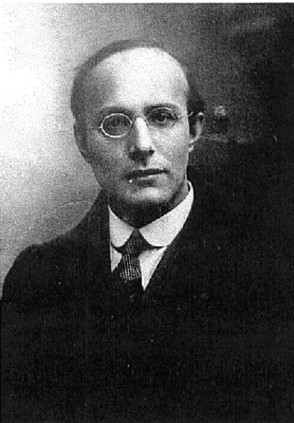 Polányi Károly (született Pollacsek) (Bécs, 1886. október 25. – Pickering (Kanada), 1964. április 23.) magyar gazdaságtörténész, szociálfilozófus, társadalompolitikus.